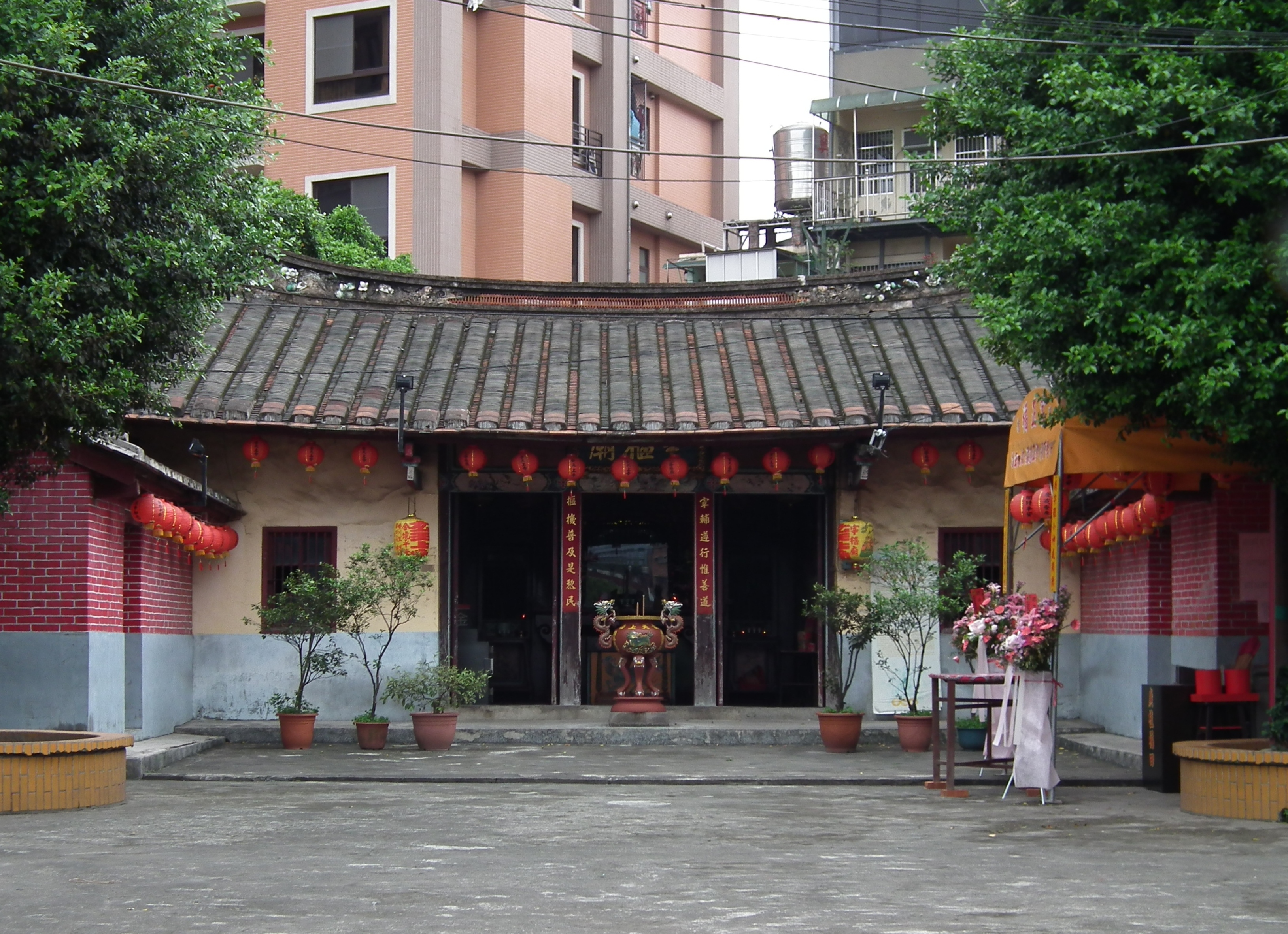 Sanxia Zaishufu Temple 三峽宰樞府